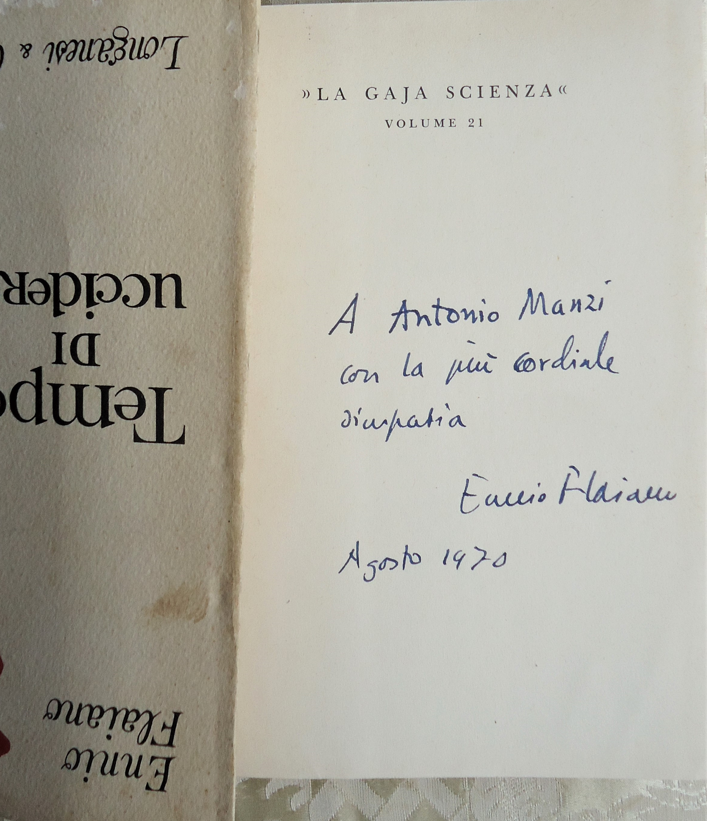 Dedica di Ennio Flaiano sul suo libro "Tempo di uccidere", Longanesi, terza edizione, 1963. La dedica è datata agosto 1970 (coll. Fausta Samaritani-autografi)